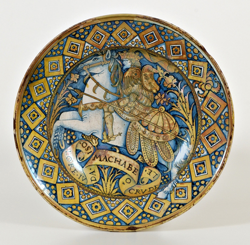 Piatto da pompa a lustro di Deruta raffigurante Giuda Maccabeo. XVI secolo.